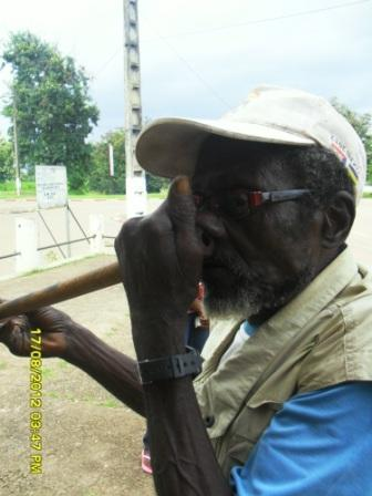 Joueur de flûte à narine. This is an image from Cameroon